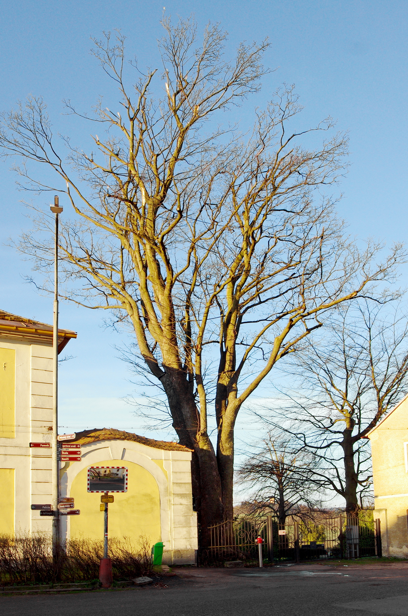 Památný strom Klen na hřbitově, Bochov, okres Karlovy Vary